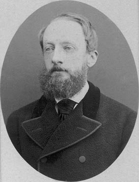 Foto uit het fotoarchief van de Eerste Kamer, foto is genomen voor 1889.